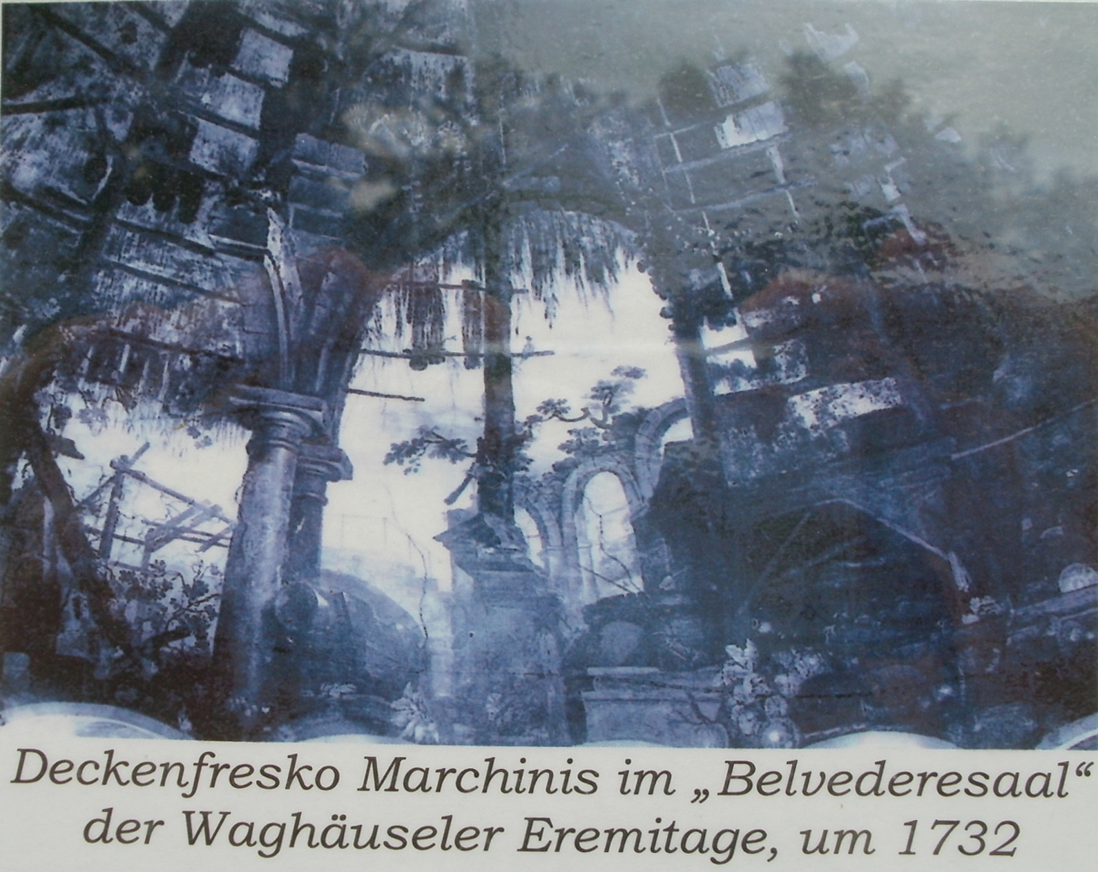 Eremitage (Waghäusel), nicht mehr erhaltenes Deckenfresko von Francesco Marchini, der auch im Schlss Bruchsal gearbeitet hatte